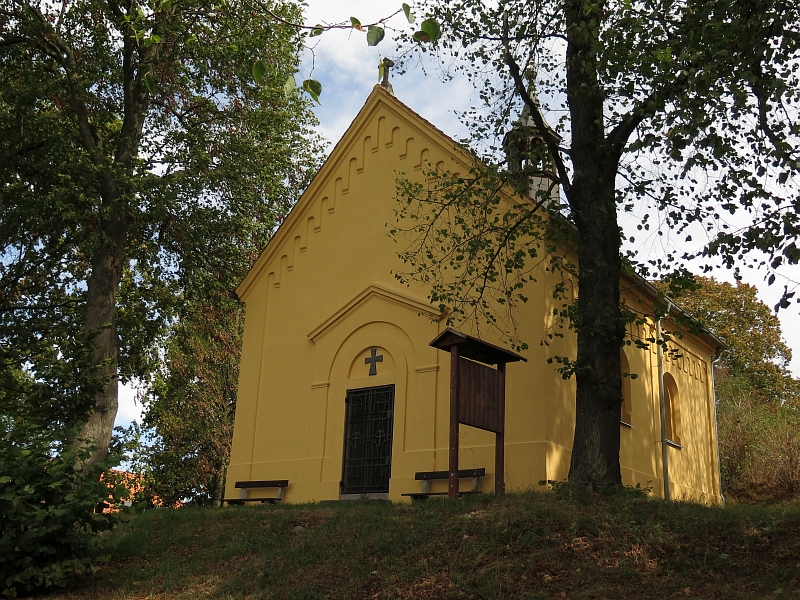 Kaple Panny Marie, Křenice (okres Klatovy).